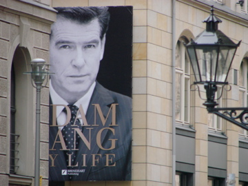 Dreharbeiten zum Film von Roman Polanski in Berlin Mitte, Charlottenstrasse